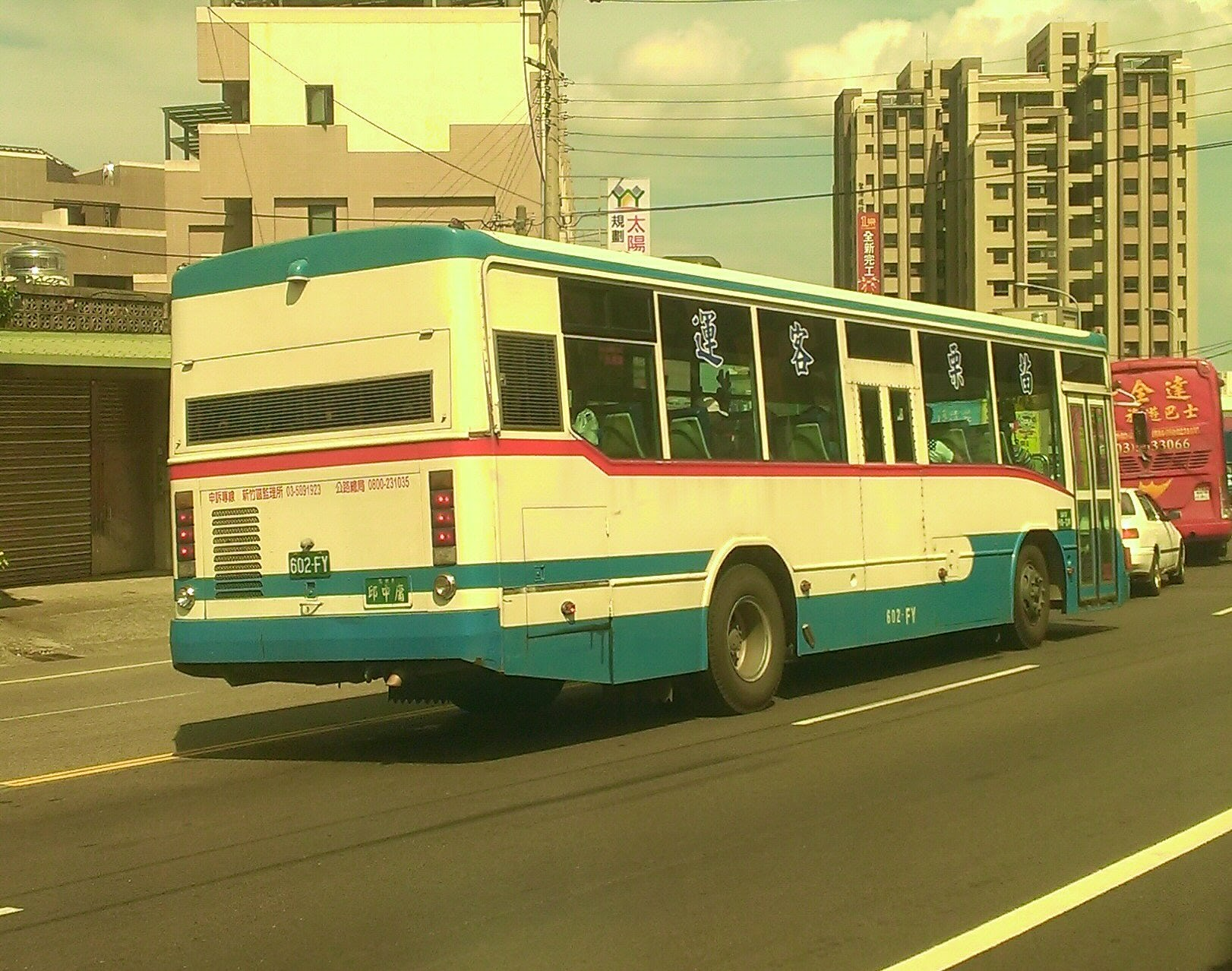 中文（台灣）: 苗栗客運2005年日野ERK2JRML大客車602-FY執行5810往竹南東站